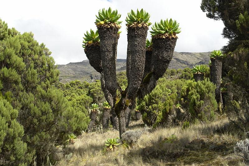 auf dem Kilimanjaro, Wachstum bis auf ca. 4500m über NN